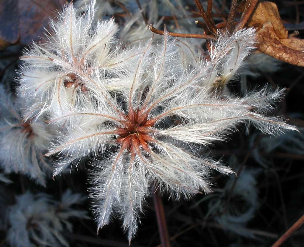 Echte Waldrebe (Clematis vitalba): Samenstand – Österreich/Steiermark/Salzkammergut/Bad Aussee/Waldgraben, Salzsteig